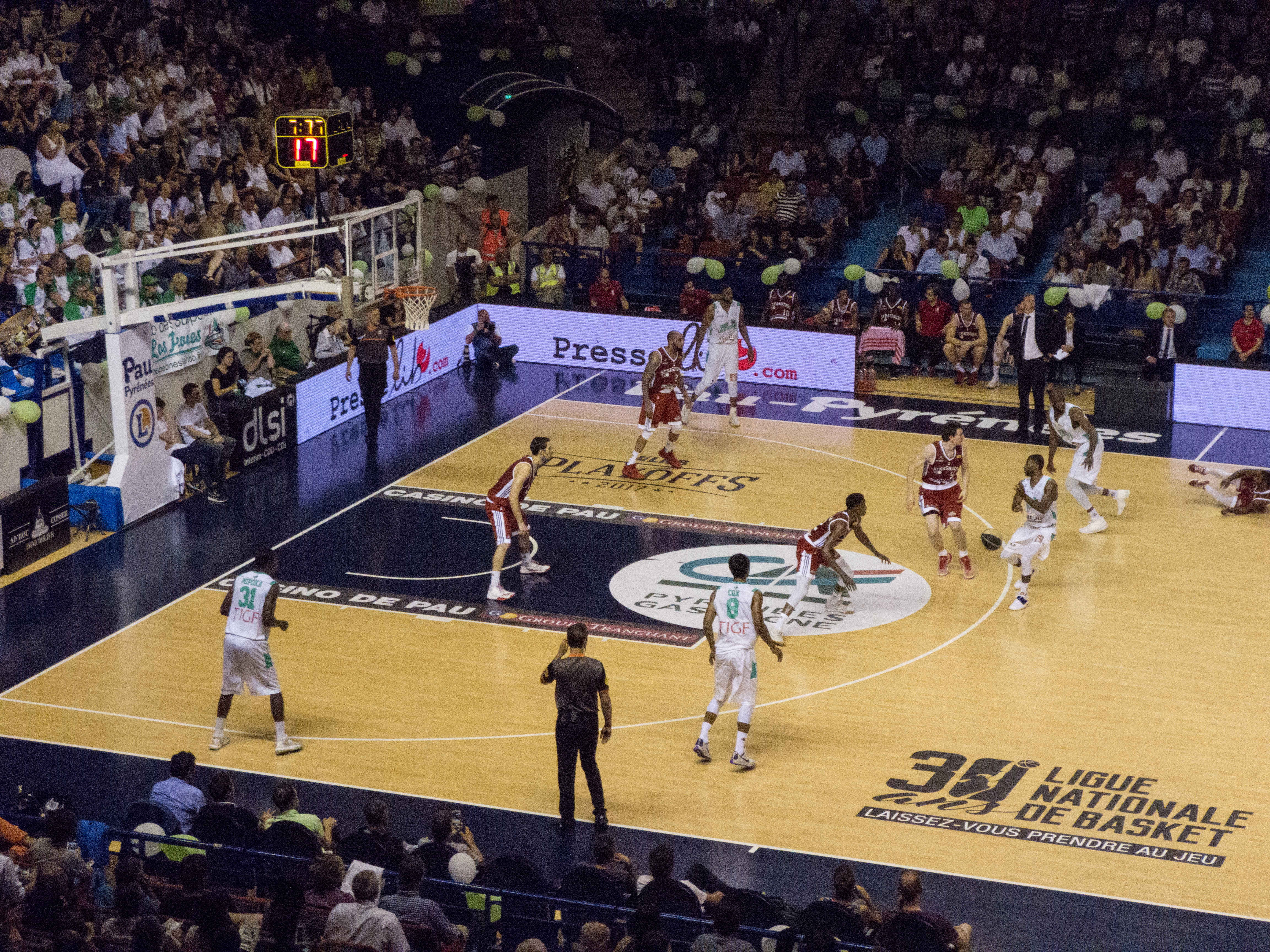 2016–17 Pro A season — 24 May 2017, Palais des Sports de Pau. Match between: Élan Béarnais Pau-Lacq-Orthez — Strasbourg Illkirch-Graffenstaden Basket